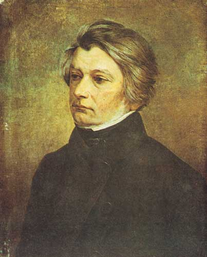 Патрэт Адама Міцкевіча